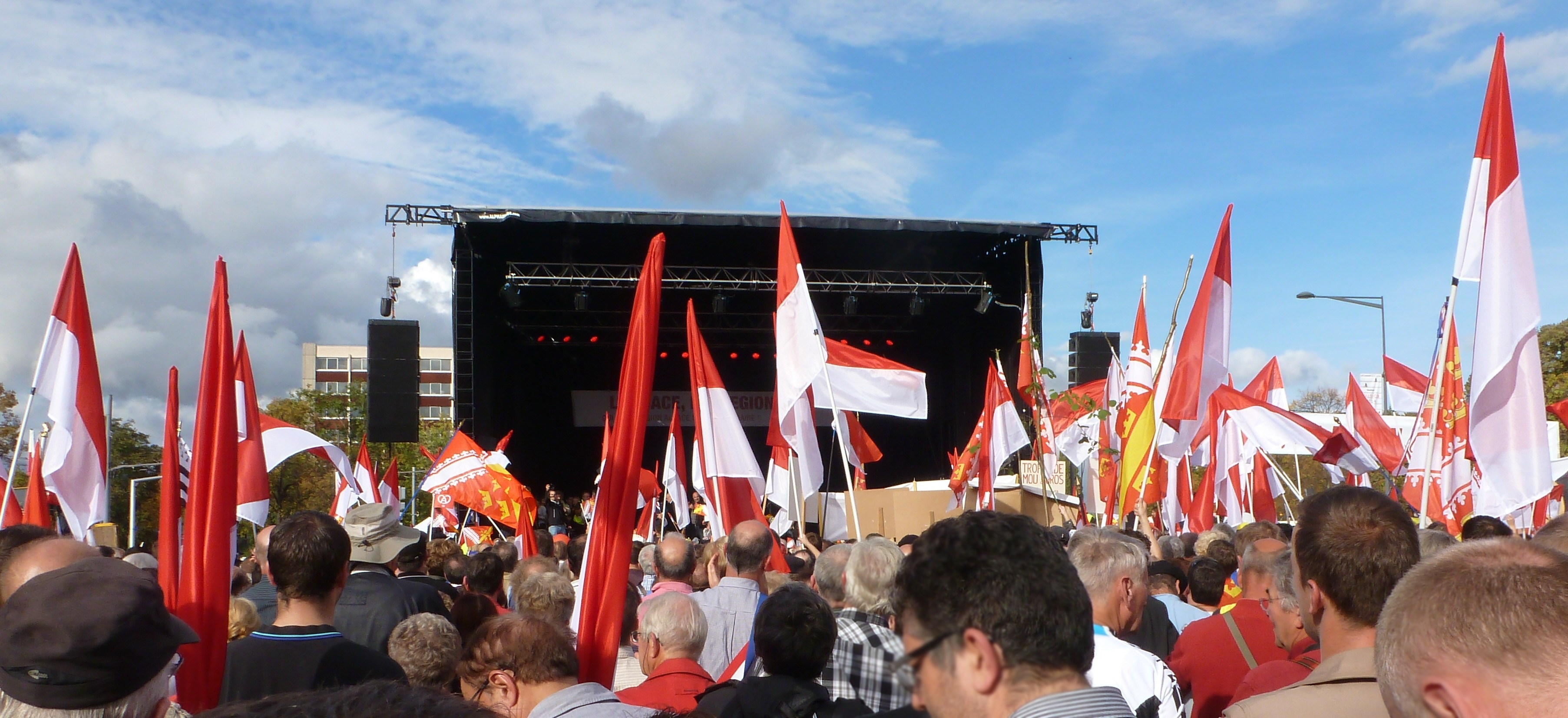 Différents drapeaux de l’Alsace à la manifestation contre la réforme territoriale et la fusion des régions Alsace, Champagne-Ardenne et Lorraine.